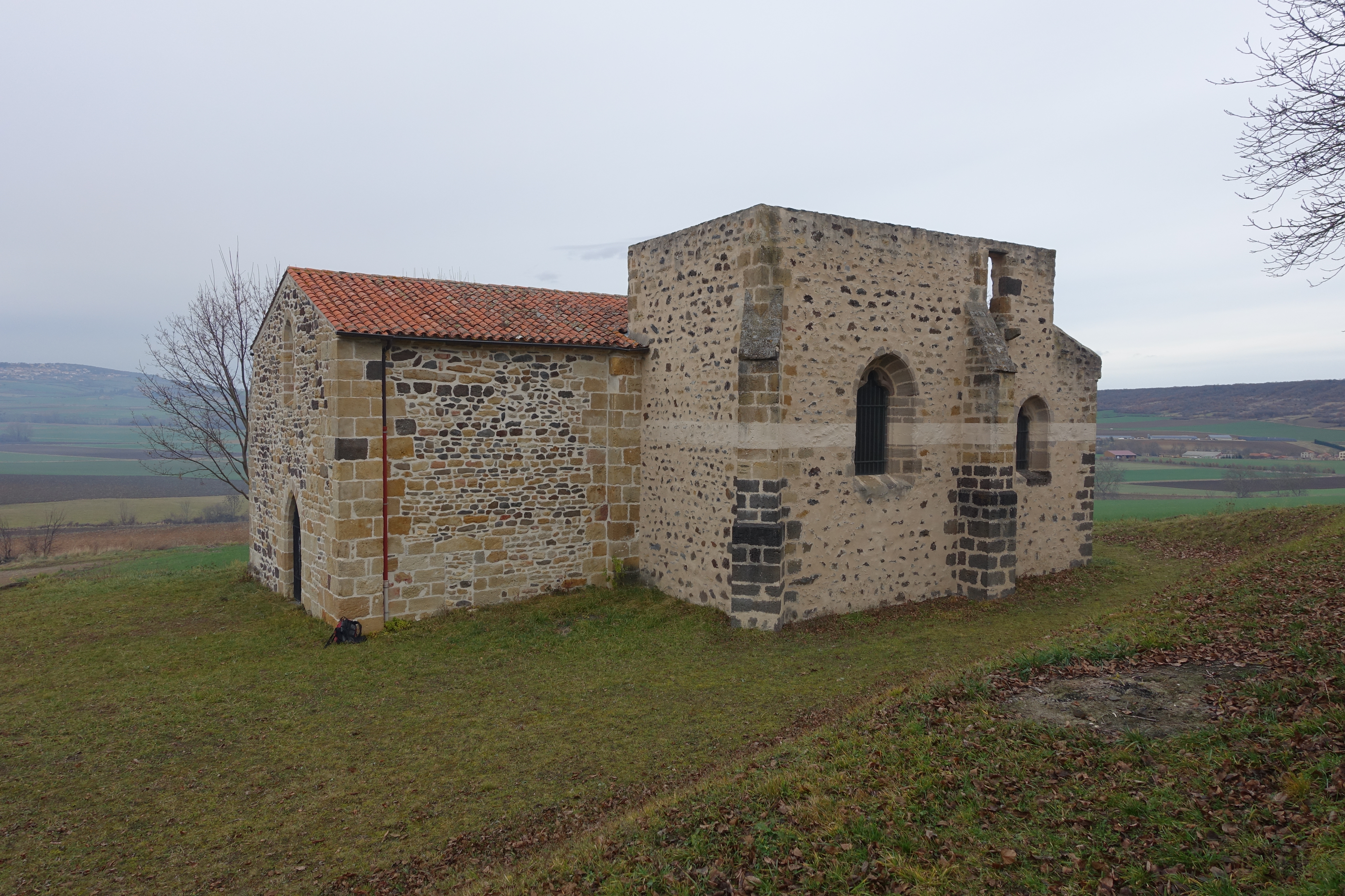 Eglise Sainte-Madeleine de Chalus, église romane construite avant 900. Restaurée de 1985 à 2010.